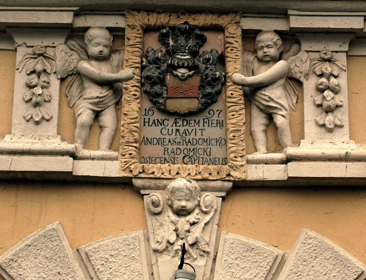 Kotwicz - herb Radomickich na fasadzie pałacu w Konarzewie